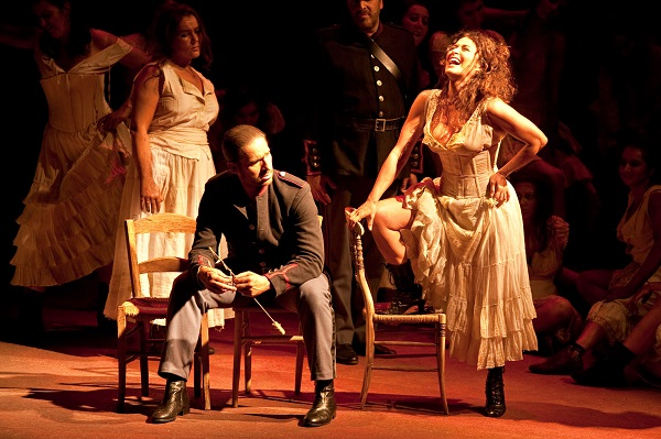 CARMEN Opera Comique - Salle Favart - Paris - Pre generale - 11.06.2009 Photo: Pierre Grosbois - Opera comique en quatre actes de Georges Bizet. Livret d'Henri Meilhac et Ludovic Halevy d'apres la nouvelle de Prosper Merimee. Cree a l'Opera Comique le 3 mars 1875. Sir John Eliot Gardiner Adrian Noble The Monteverdi Choir Orchestre Revolutionnaire et Romantique Direction musicale, Sir John Eliot Gardiner Mise en scene, Adrian Noble Decors et costumes, Mark Thompson Lumieres, Jean Kalman Choregraphie, Sue Lefton Assistant musical, Benjamin Bayl Collaborateur artistique a la mise en scene, Elsa Rooke Chef de chant, Nathalie Steinberg Assistant costumes, Alain Blanchot Assistante lumiere, Nathalie Perrier Maitre d'armes, Francois Rostain Second chef de chant, Mathieu Pordoy Carmen, Anna Caterina Antonacci Don Jose, Andrew Richards Micaela, Anne-Catherine Gillet Escamillo, Nicolas Cavallier Le Dancaire, Francis Dudziak Le Remendado, Vincent Ordonneau Zuniga, Matthew Brook Morales, Riccardo Novaro Frasquita, Virginie Pochon Mercedes, Annie Gill / Louise Innes Lillas Pastia, Simon Davies Un guide, Lawrence Wallington The Monteverdi Choir Maitrise des Hauts-de-Seine Orchestre Revolutionnaire et Romantique